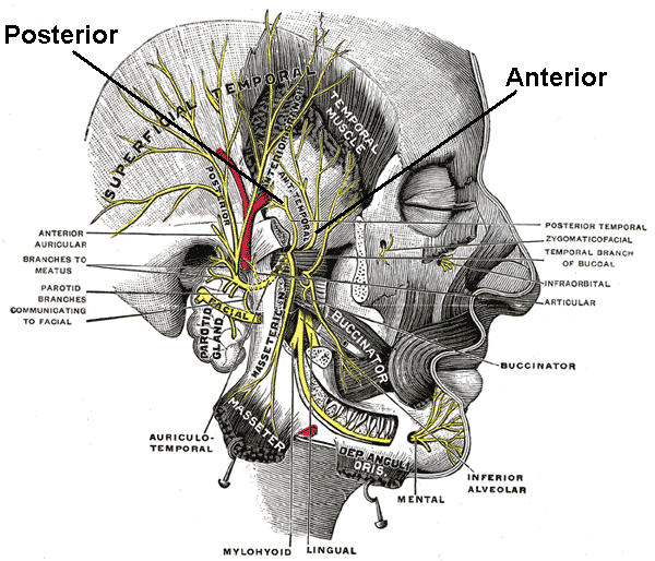 Доњовилични живац.